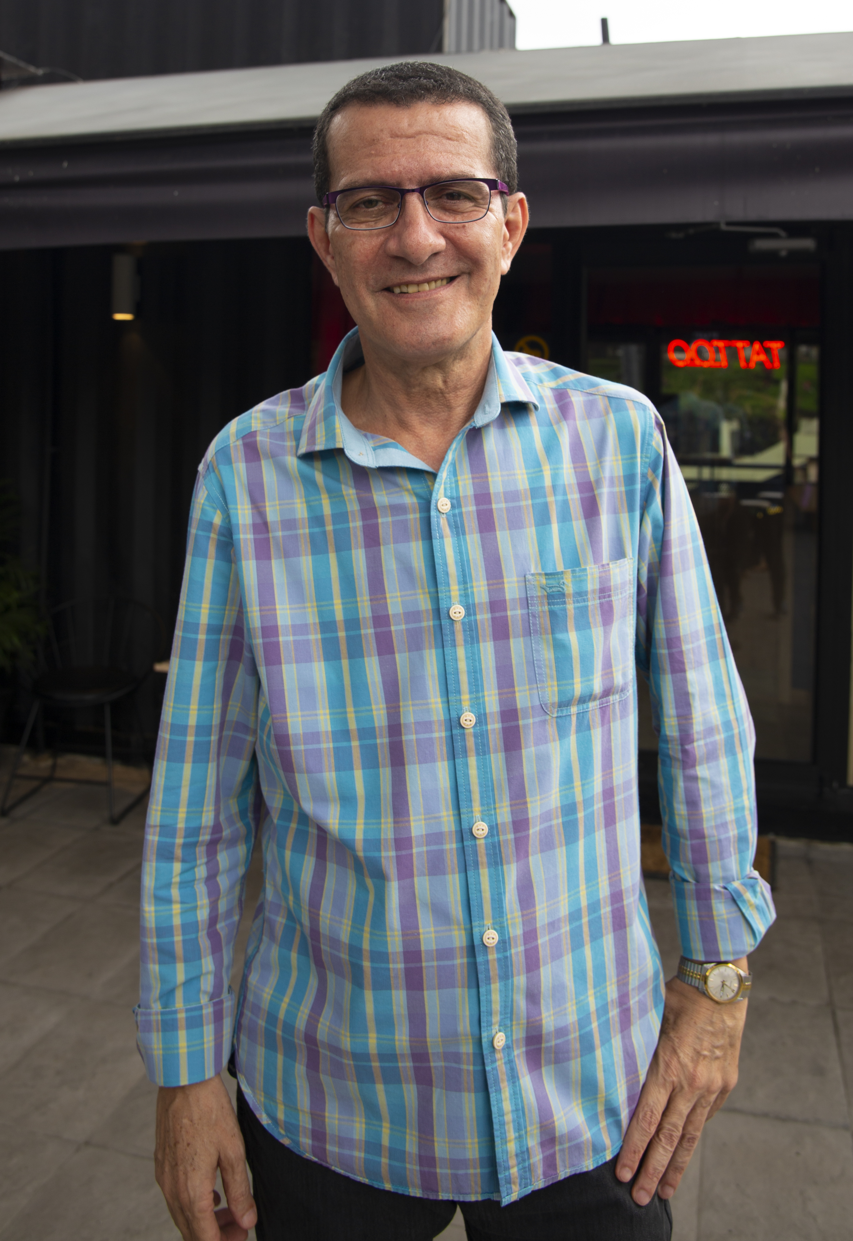 Polo Baquerizo en 2019.